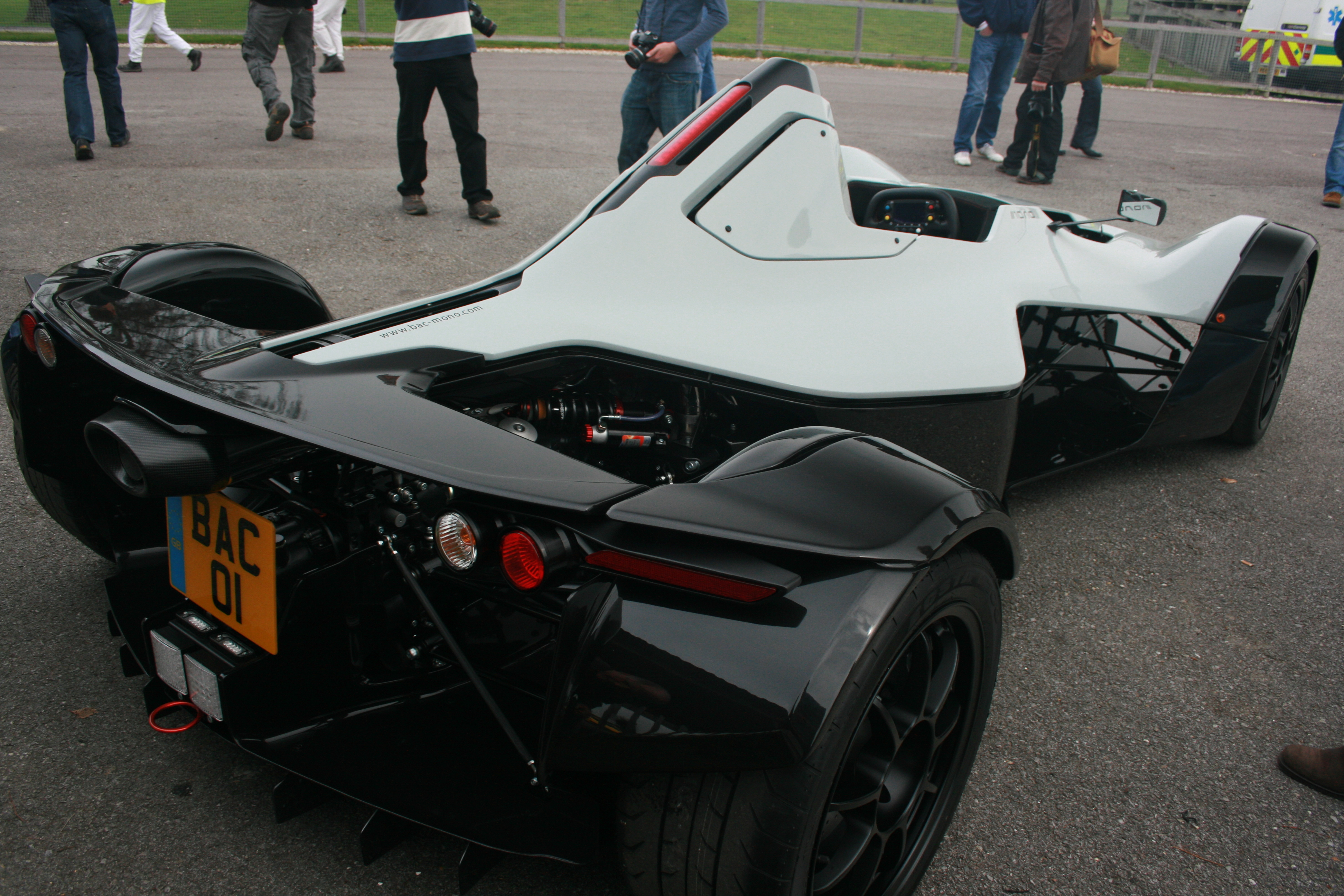 BAC Mono